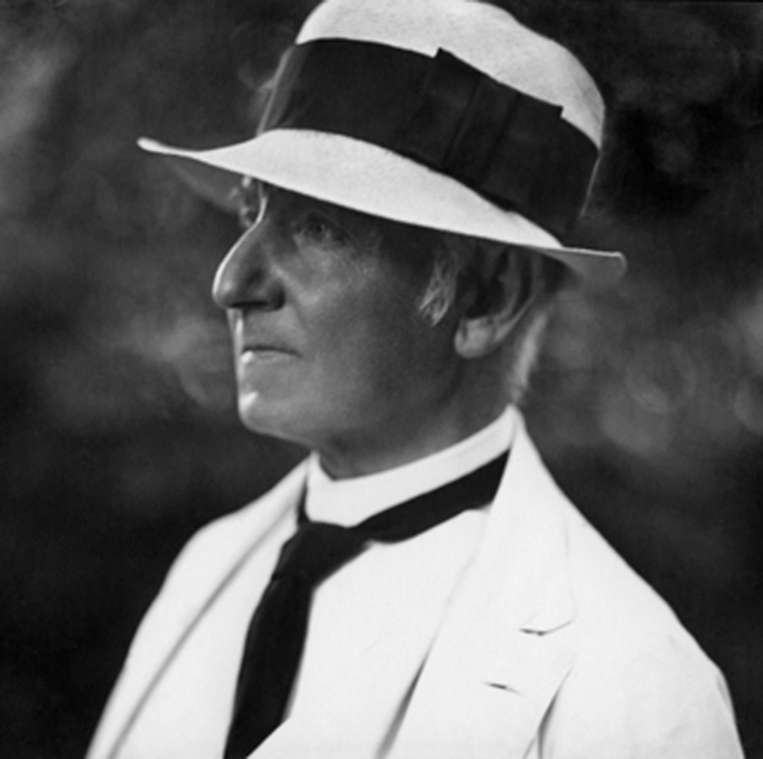 Carl Paul (1857-1927) war deutscher Pfarrer in Rothschönberg und Lorenzkirch, Missionsdirektor des Leipziger Missionswerkes und Honorarprofessor für neuere Missionsgeschichte und Missionskunde der Universität Leipzig. Das Bild zeigt ihn 1927 im letzten Lebensjahr in Schweta bei Mügeln.